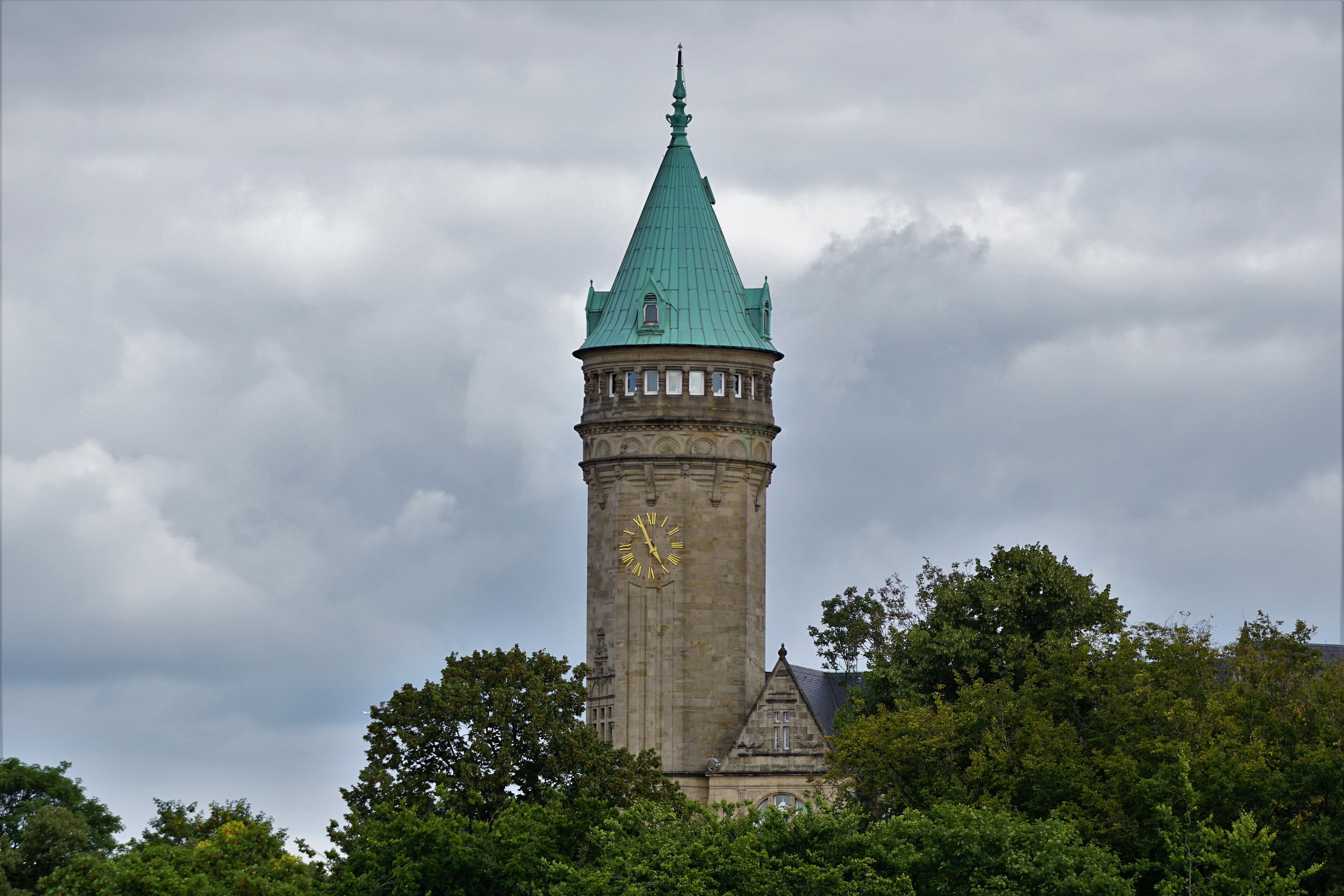 Luxembourg, tour du siège de la Banque et caisse d'épargne de l'État